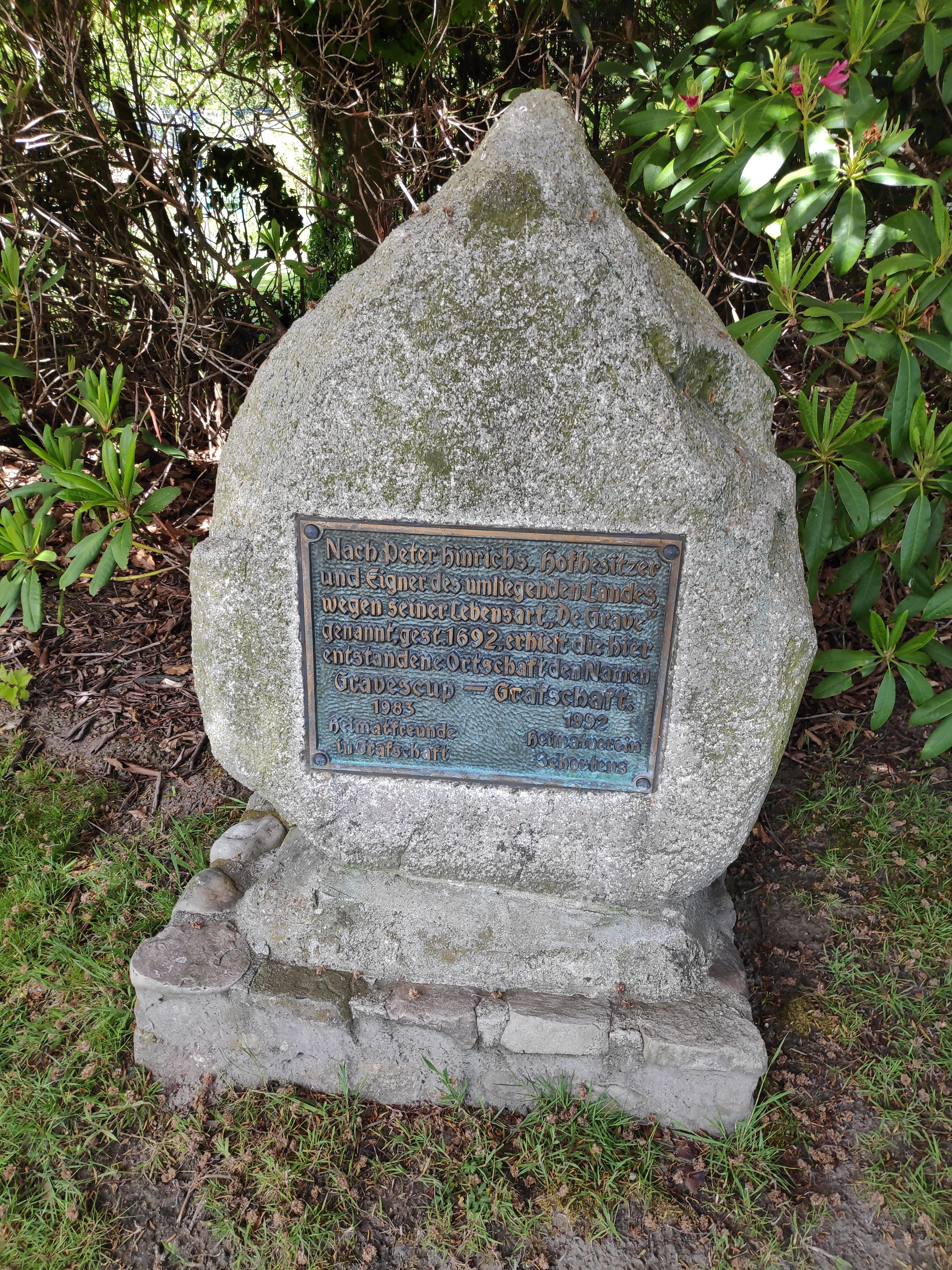 Denkmal für den Namensgeber der Ortschaft Grafschaft bei Schortens, Peter Hinrichs